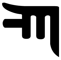 ка